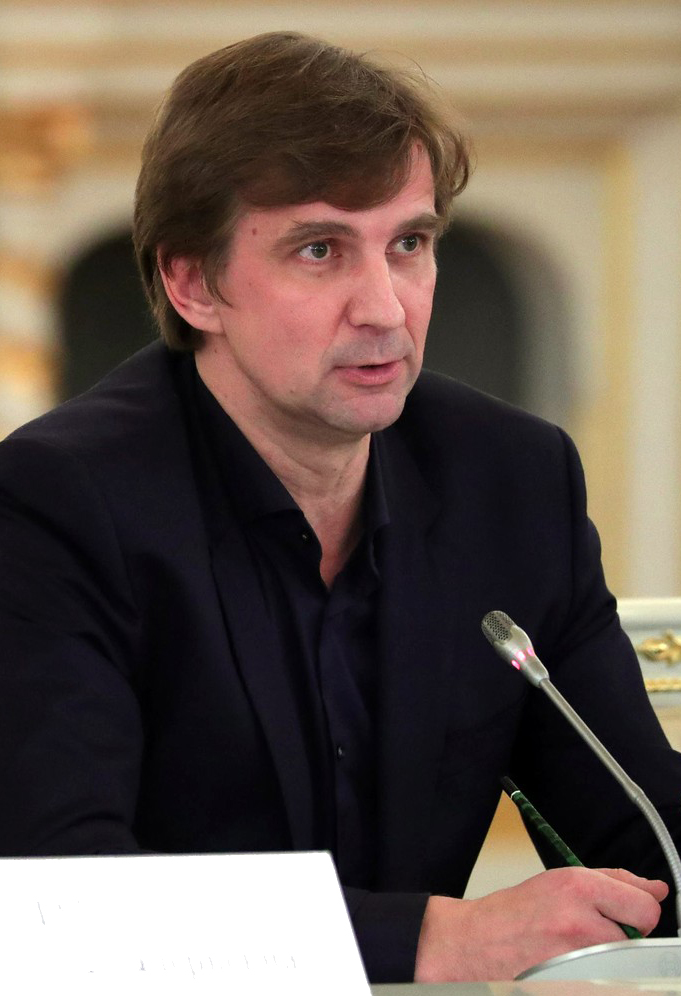 Журналист Станислав Кучер во время заседания Совета по развитию гражданского общества и правам человека.